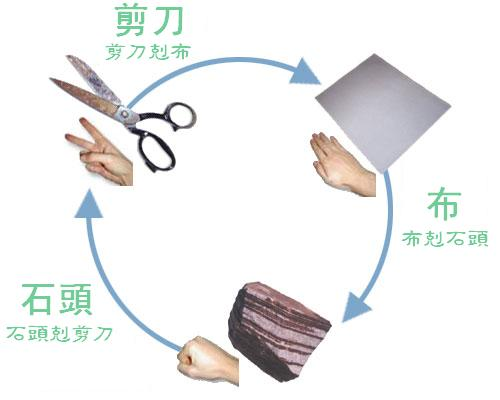 剪刀、石頭、布